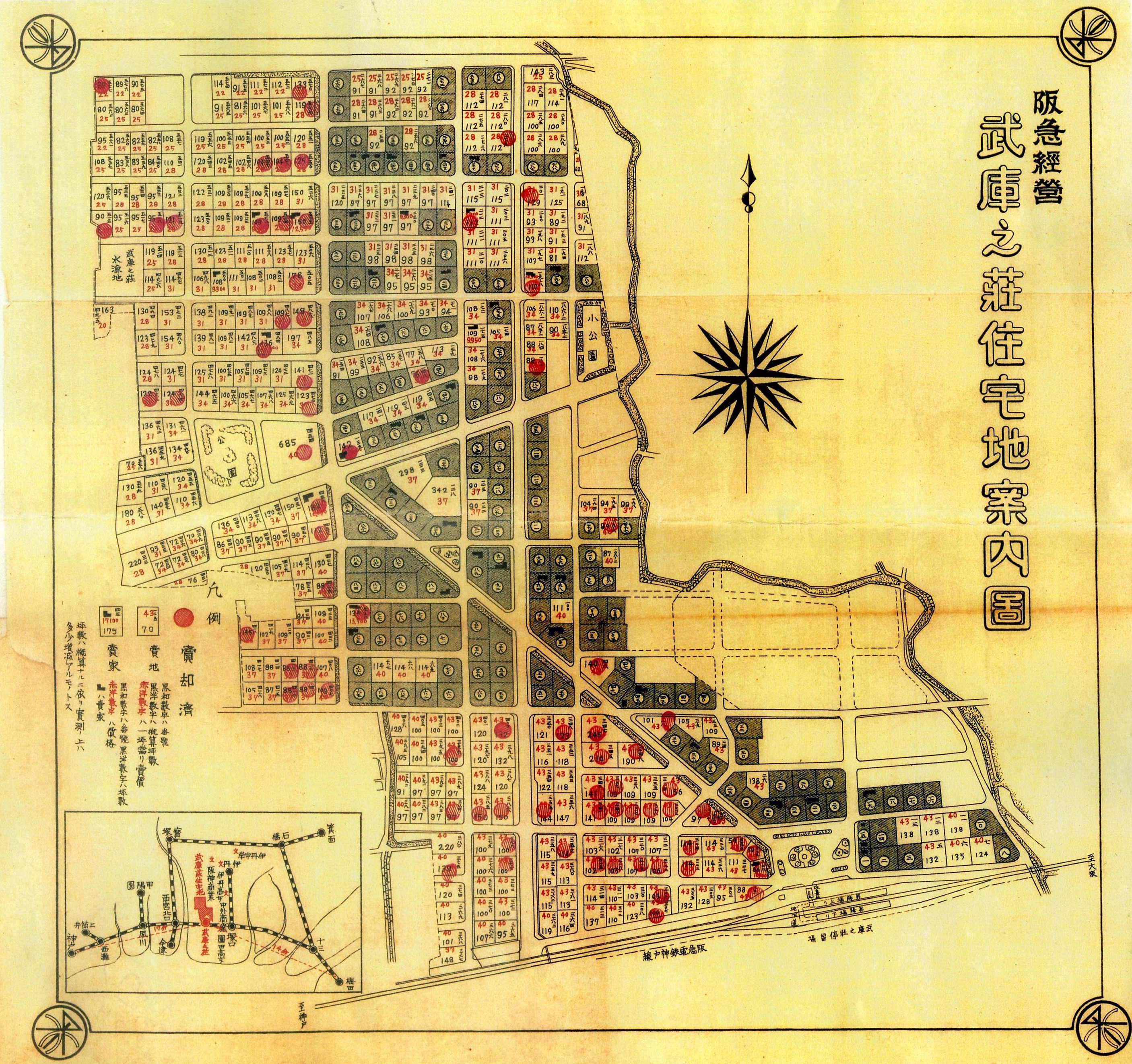 赤地の表紙のパンフレット「武庫之荘大住宅地」に掲載。発行年の記載なし。